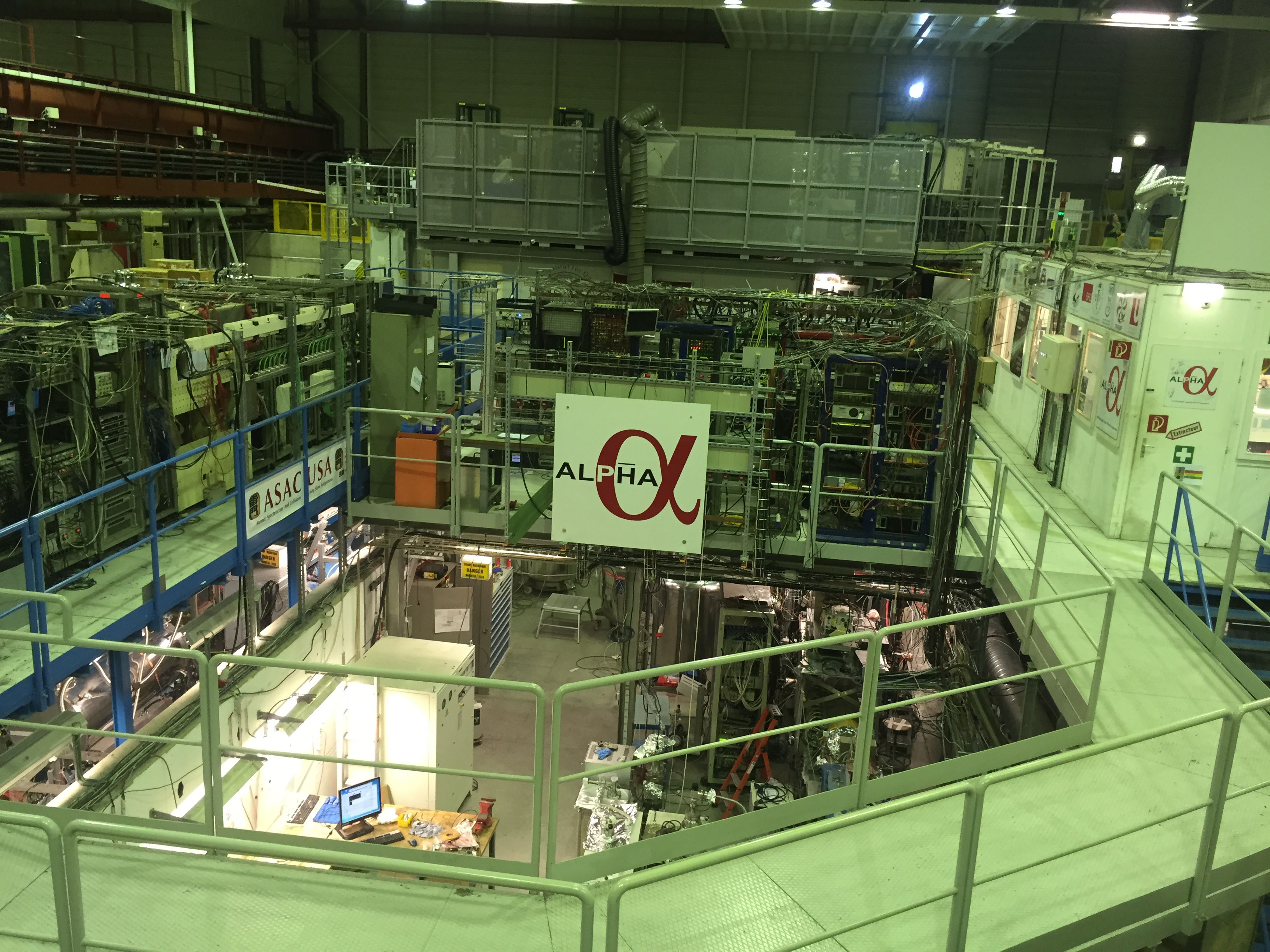 ניסוי אלפא